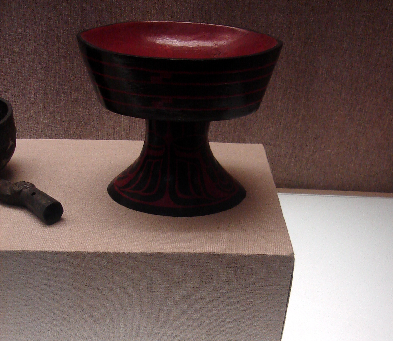 侯古堆一号墓出土木豆，现藏于信阳博物馆。